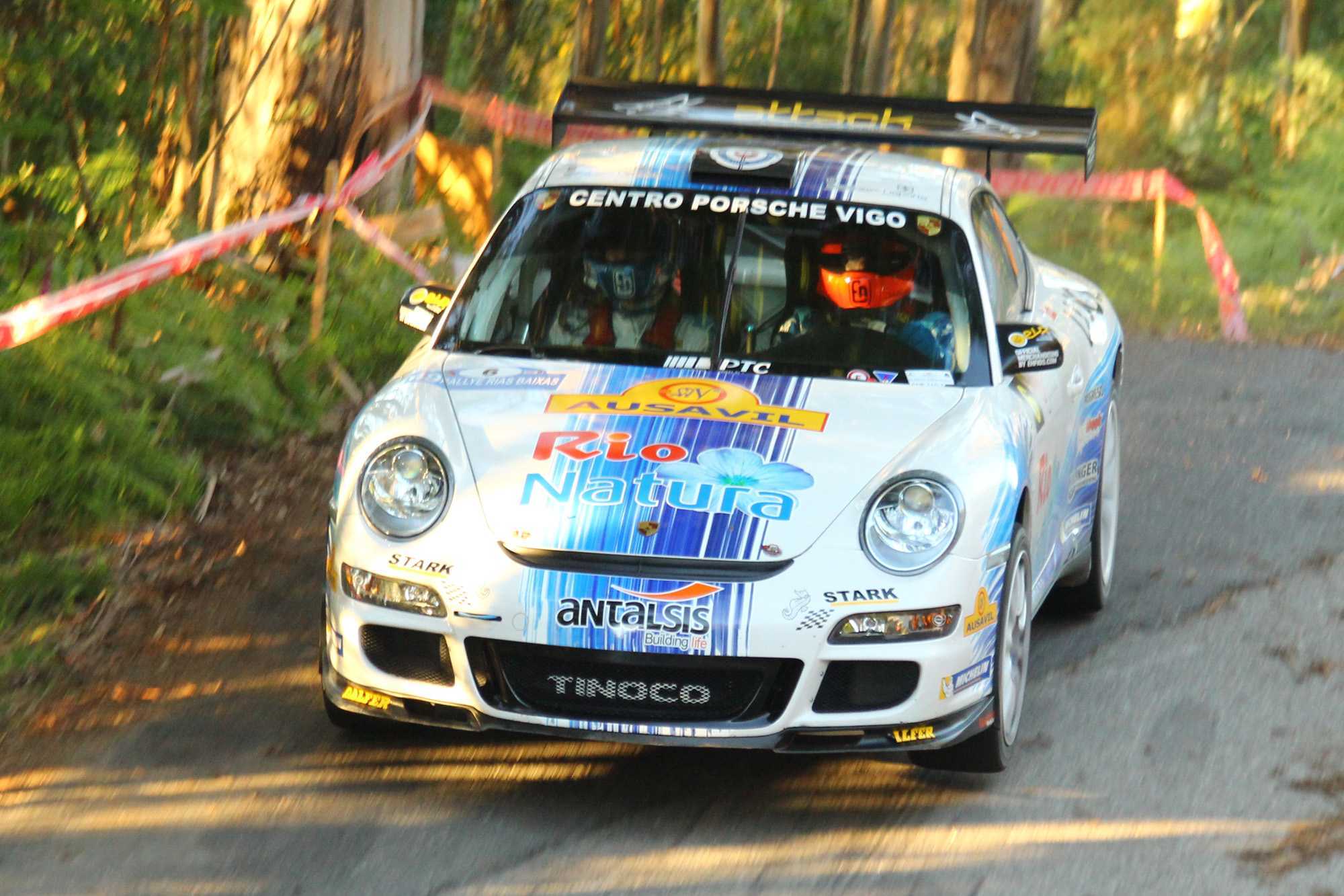 Rally Rias Baixas 2013 (Sergio Vallejo)